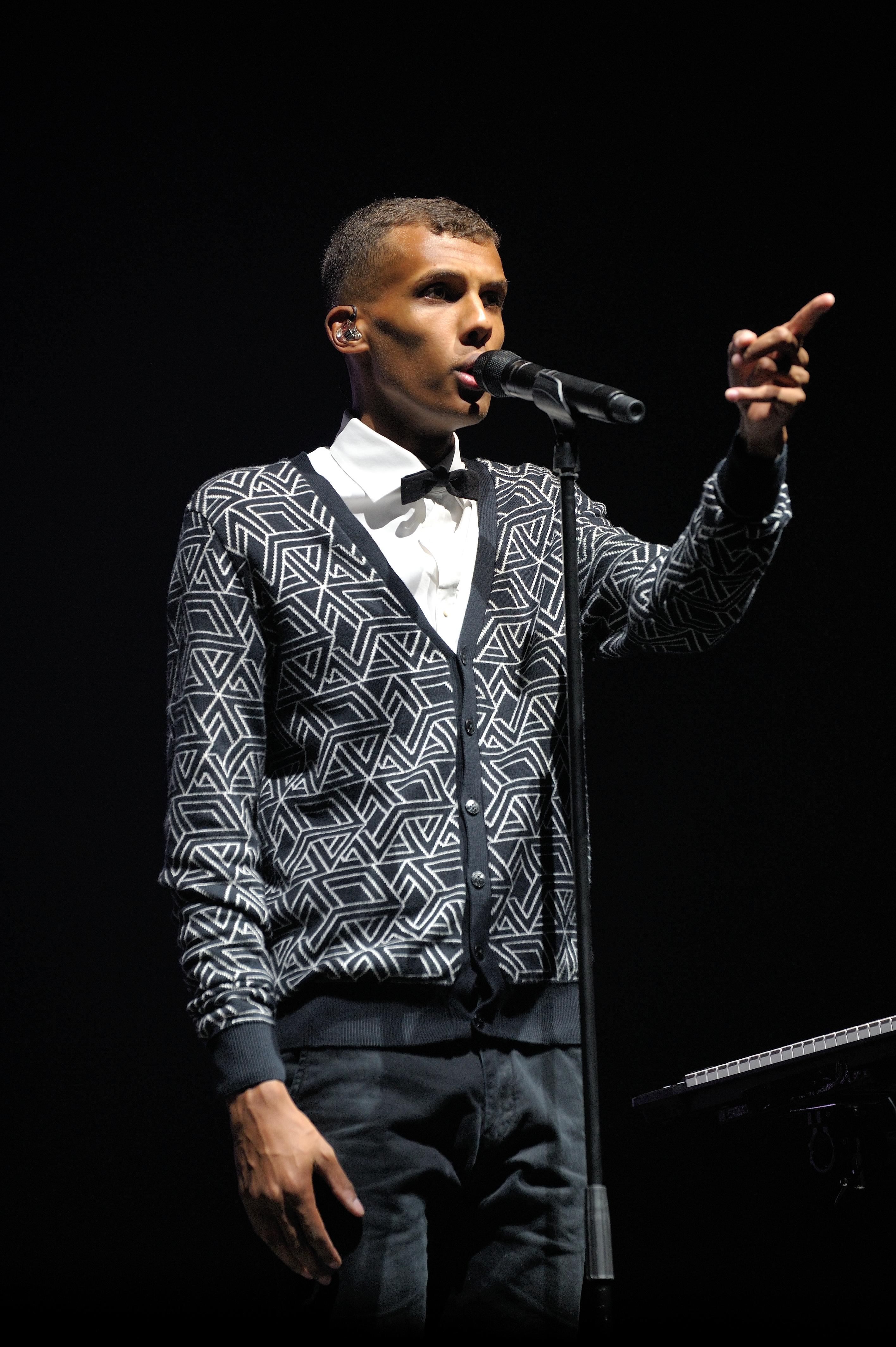 Stromae vibrant d'émotions sur la grande scène d'Ardèche Aluna Festival.